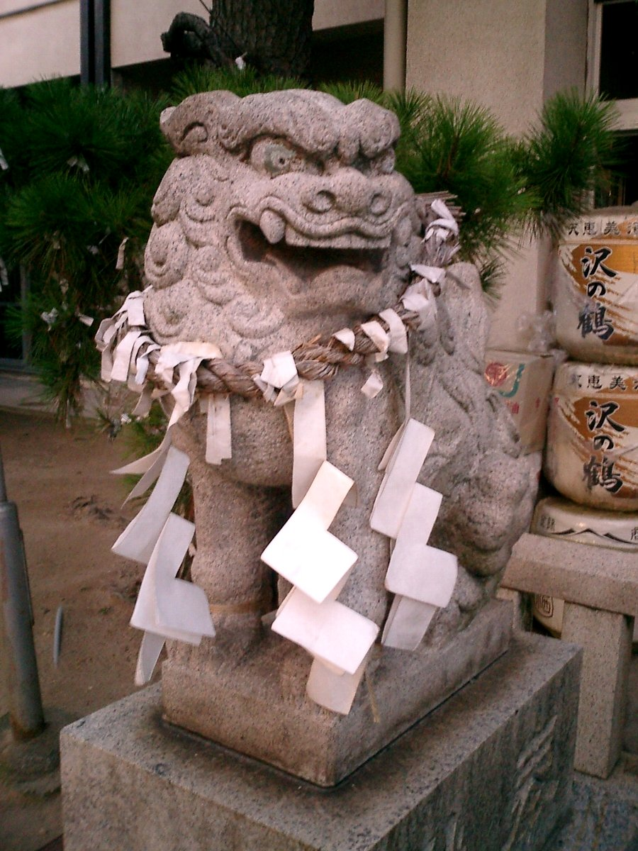 Komainu